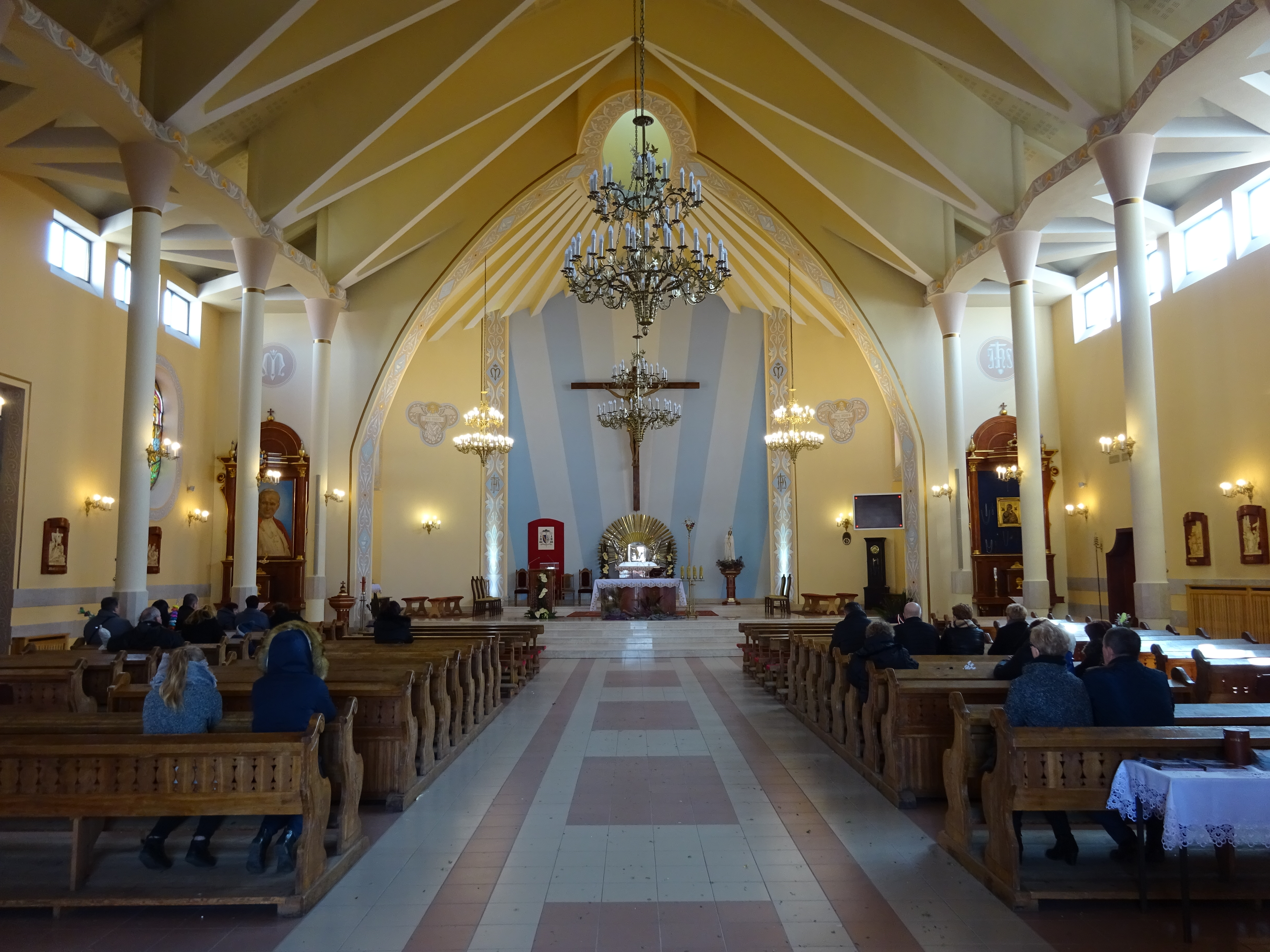 Kościół Chrystusa Króla Wszechświata w Łysych - nawa główna